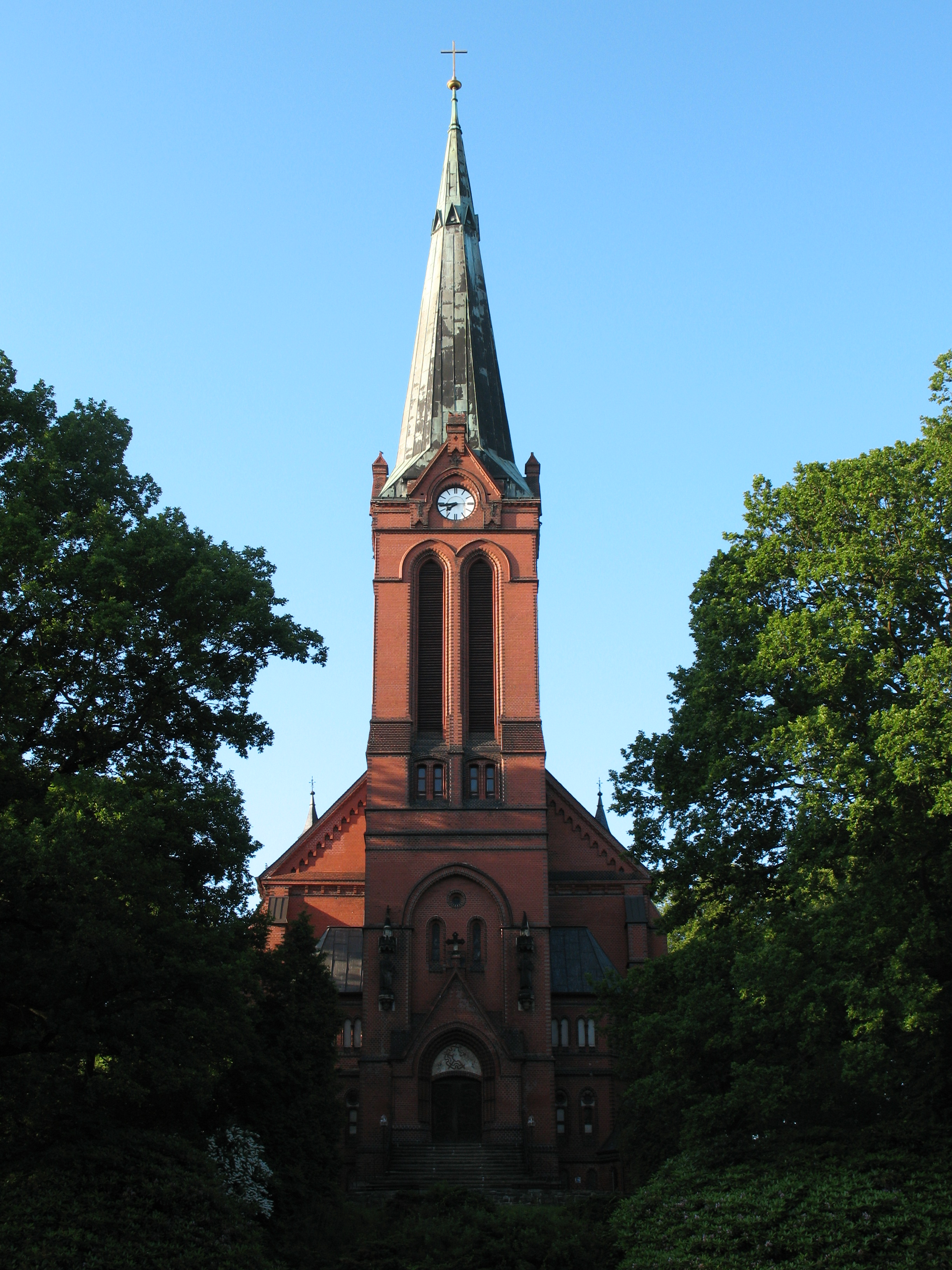 Hohndorf (Sachsen), Lutherkirche